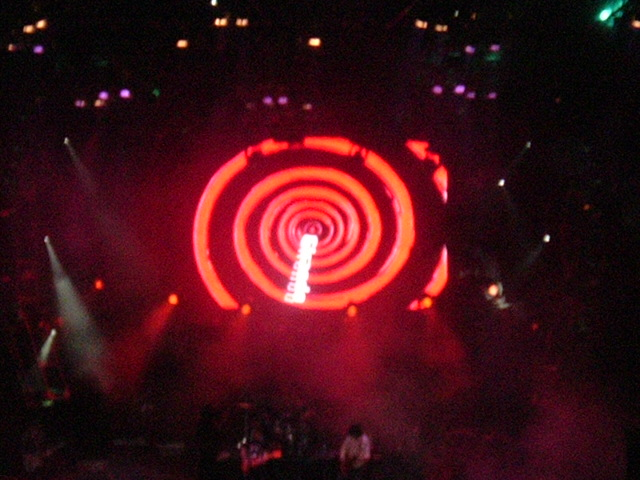 Ratones Paranoices. Recital en el Quilmes Rock. Ferro. Buenos Aires. Argentina. 2004